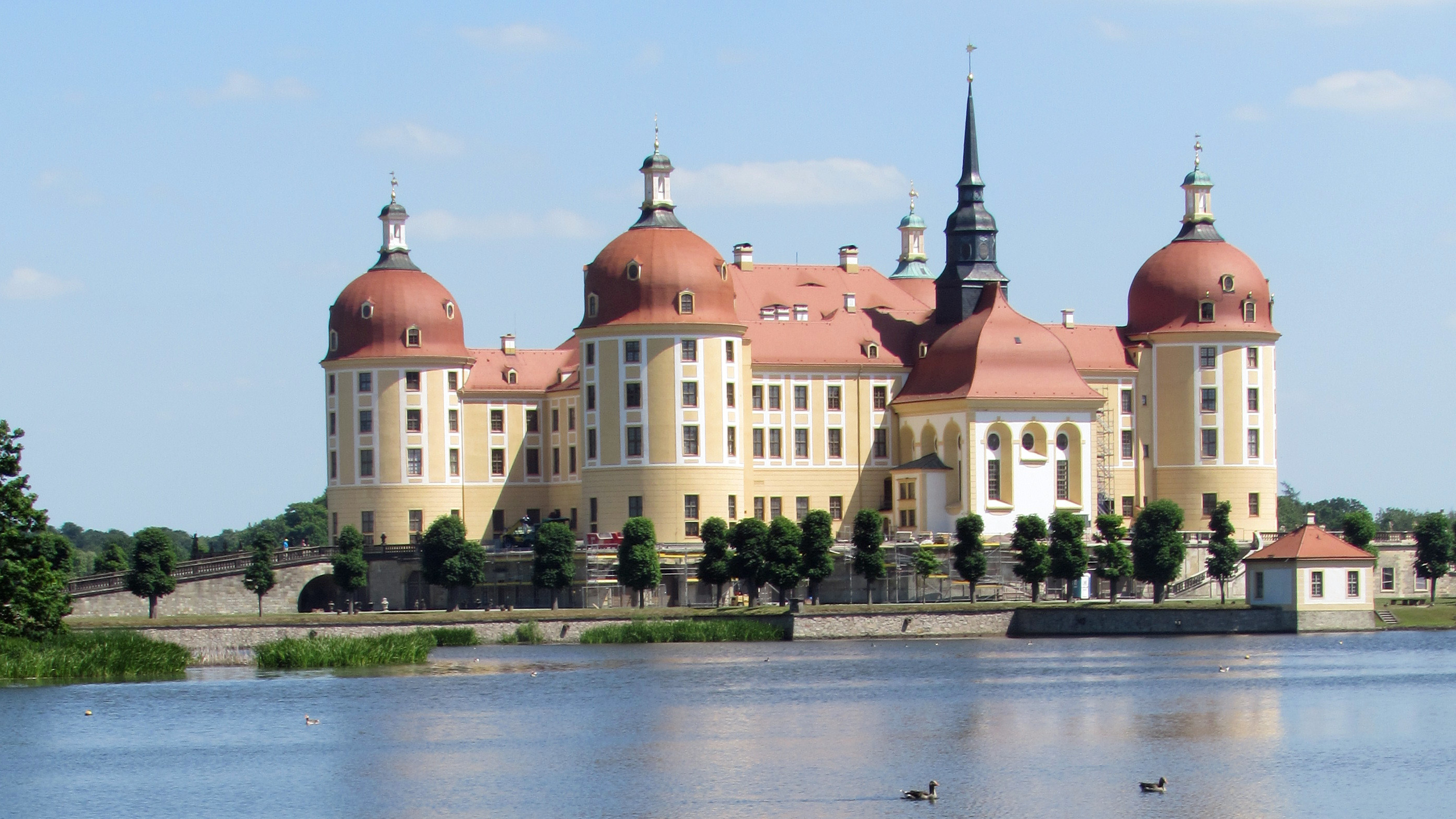 Wasserschloss Moritzburg bei Dresden